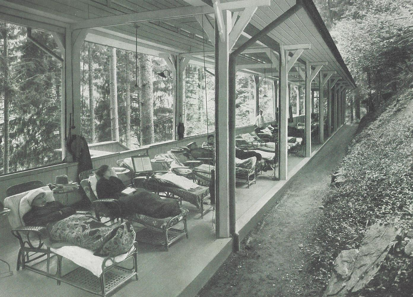 Sanatorium St. Blasien, Liegehalle im Tannenwald, Aufnahme 1914 aus: Sanatorium St. Blasien Heilanstalt für Lungenkranke, C.A. Wagner Freiburg